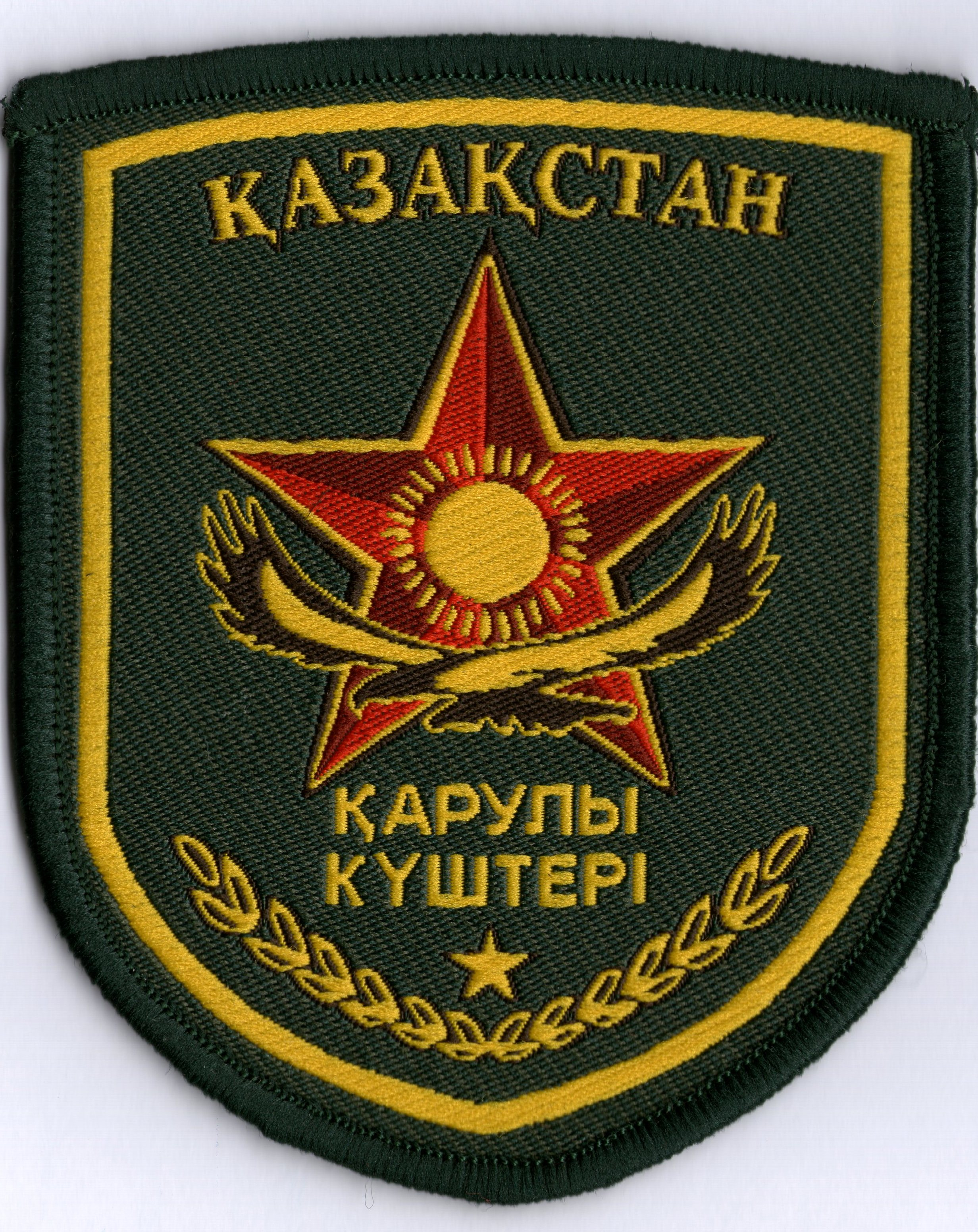 Общевойсковой нарукавный знак Вооружённых Сил Республики Казахстан